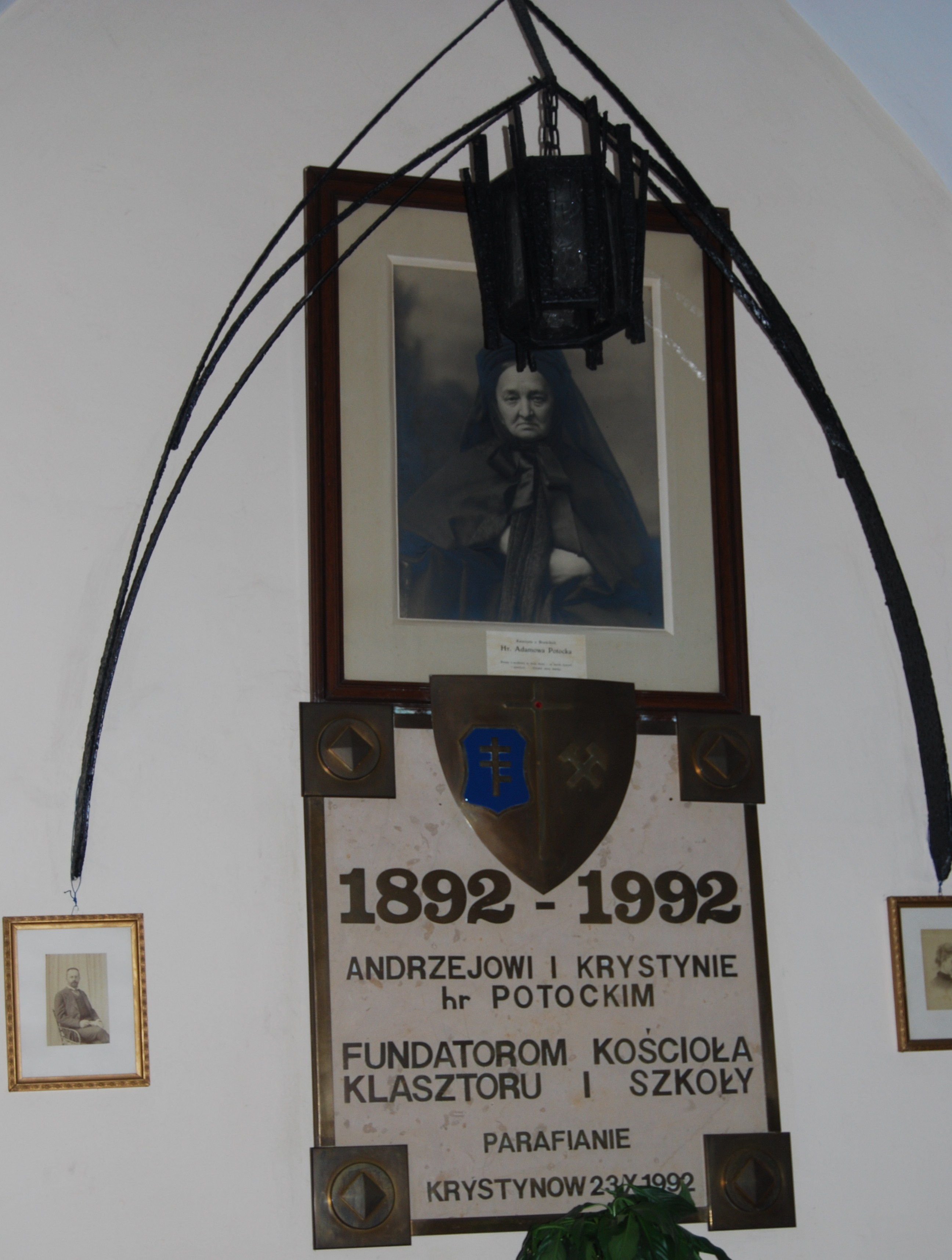 Parafia Rzymskokatolicka pw. Św. Barbary w Trzebini - Krystynowie. Tablica.